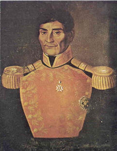 Insurgente mexicano